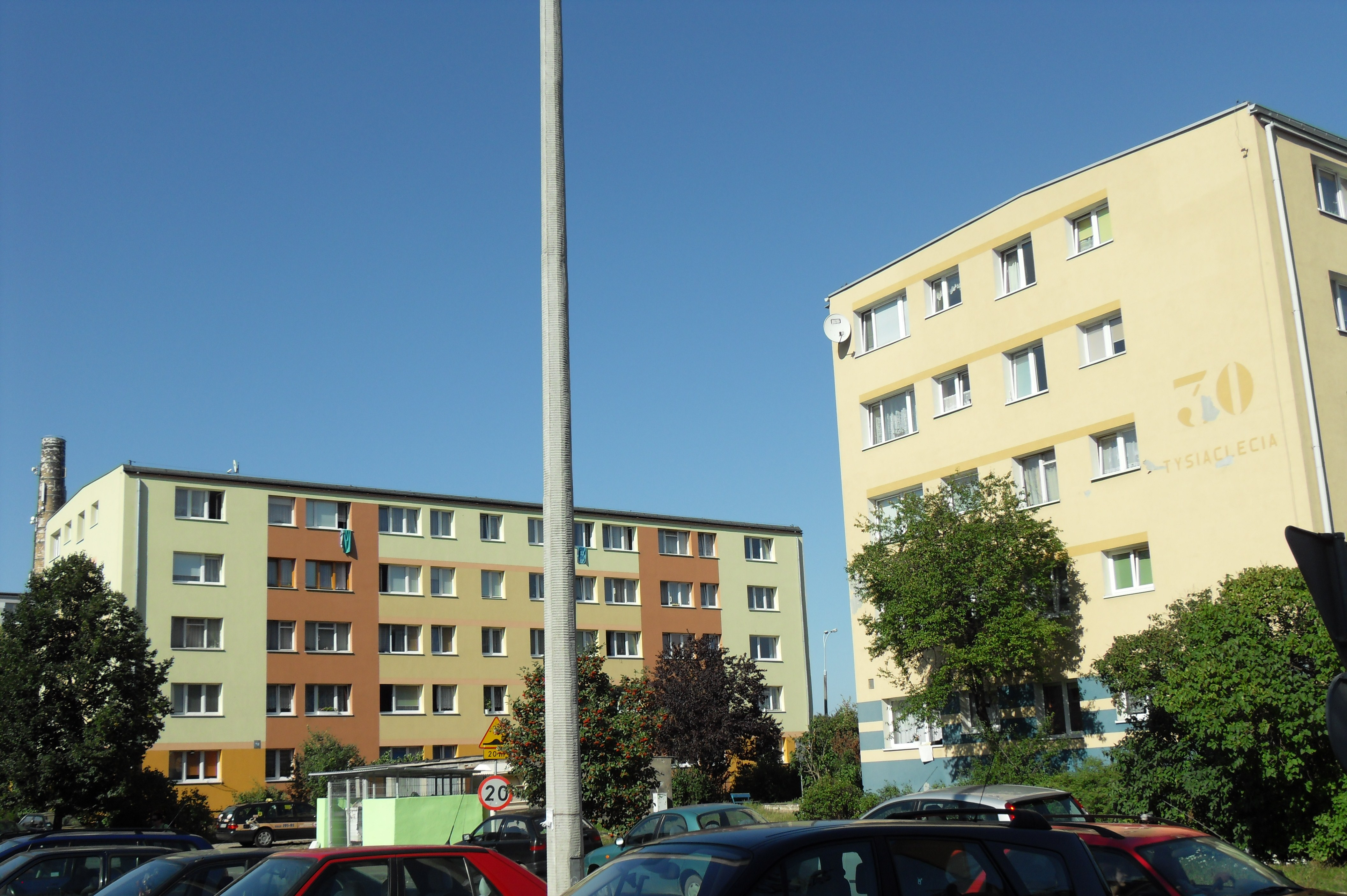 Gdańsk. Osiedle Tysiąclecia, ul. Tysiąclecia.